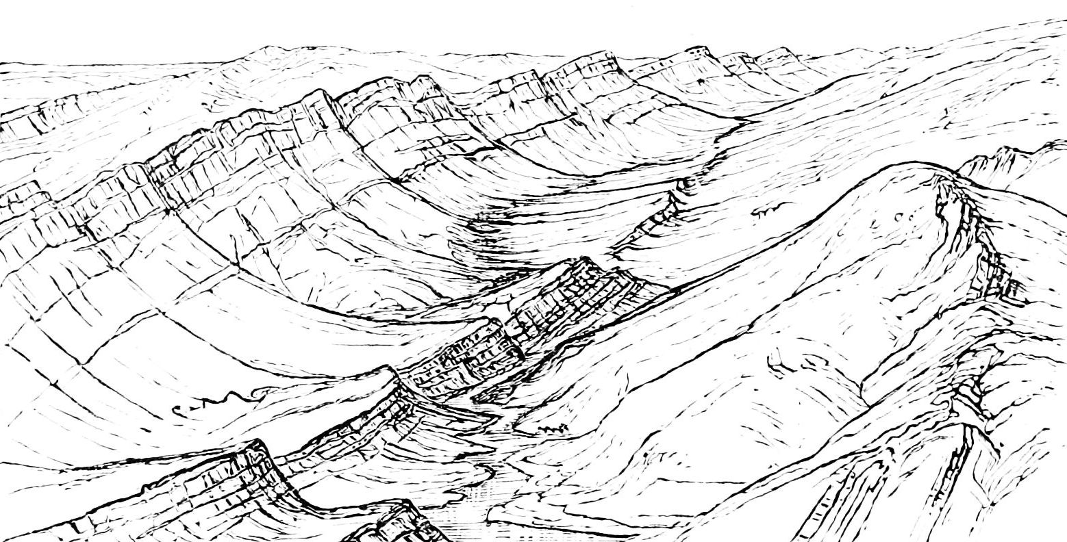 Monoclinal valley